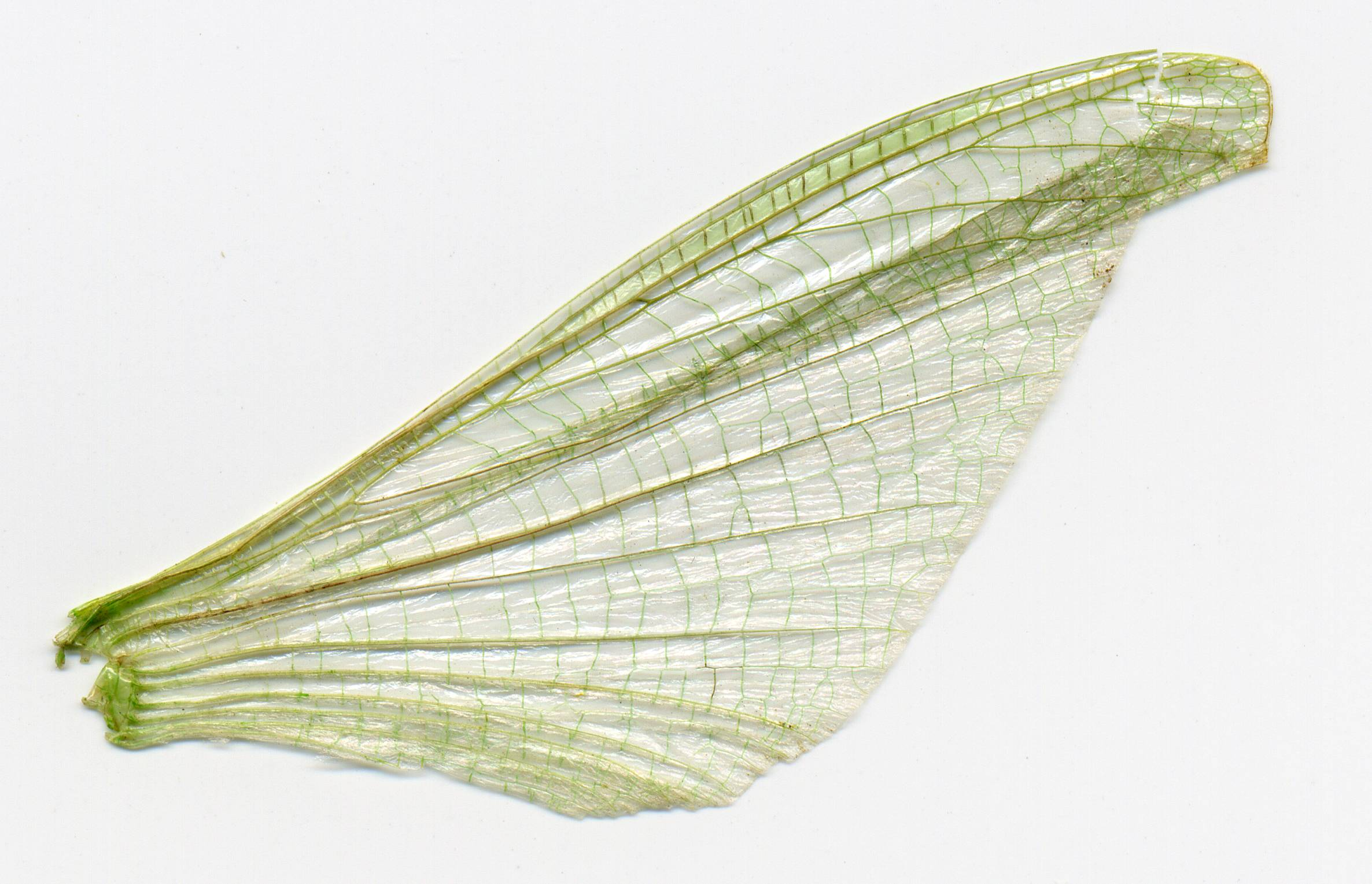 Крыло насекомого. Найдено в Ласпинской бухте